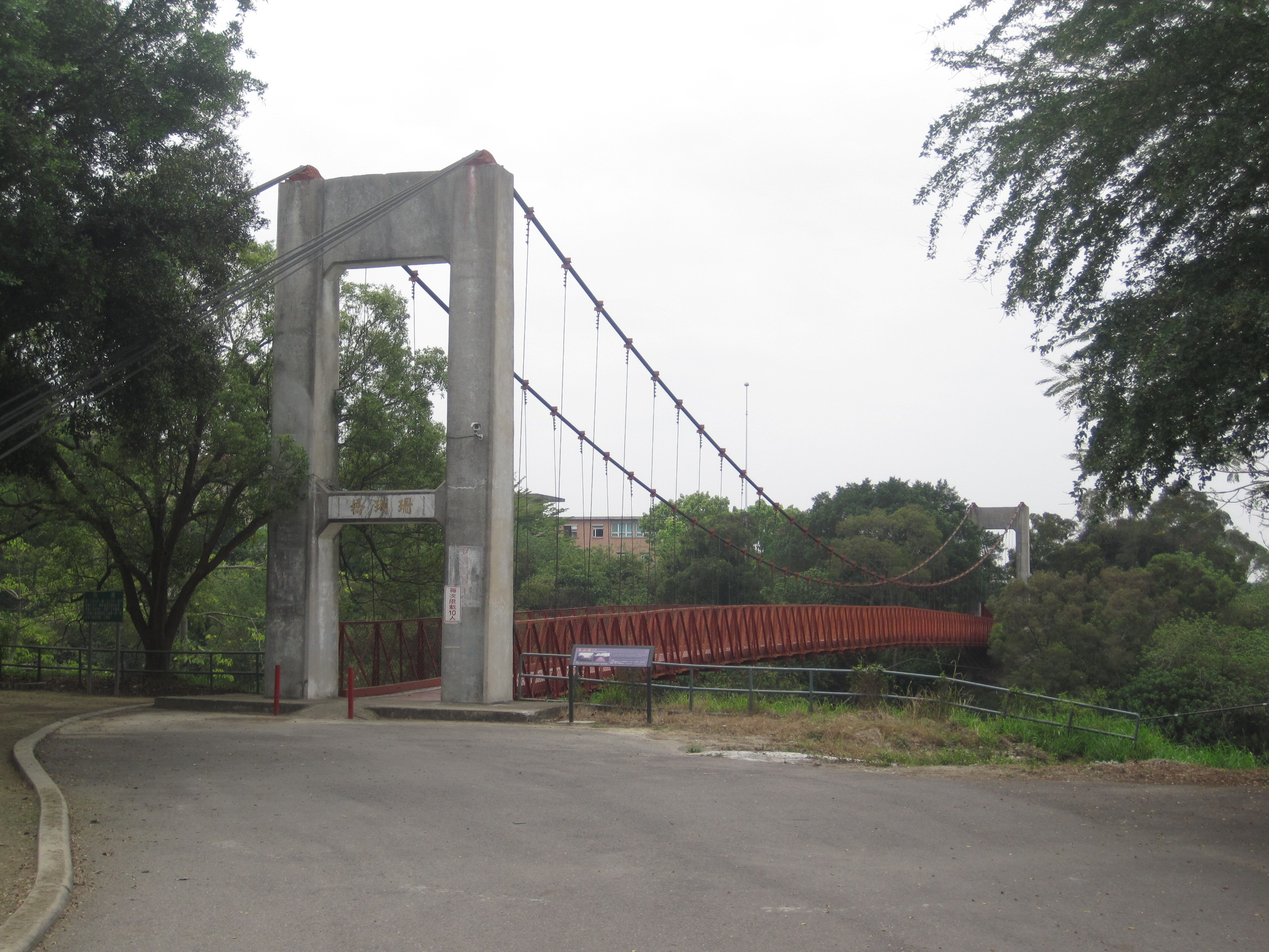 中文（台灣）: 烏山頭水庫珊瑚橋。